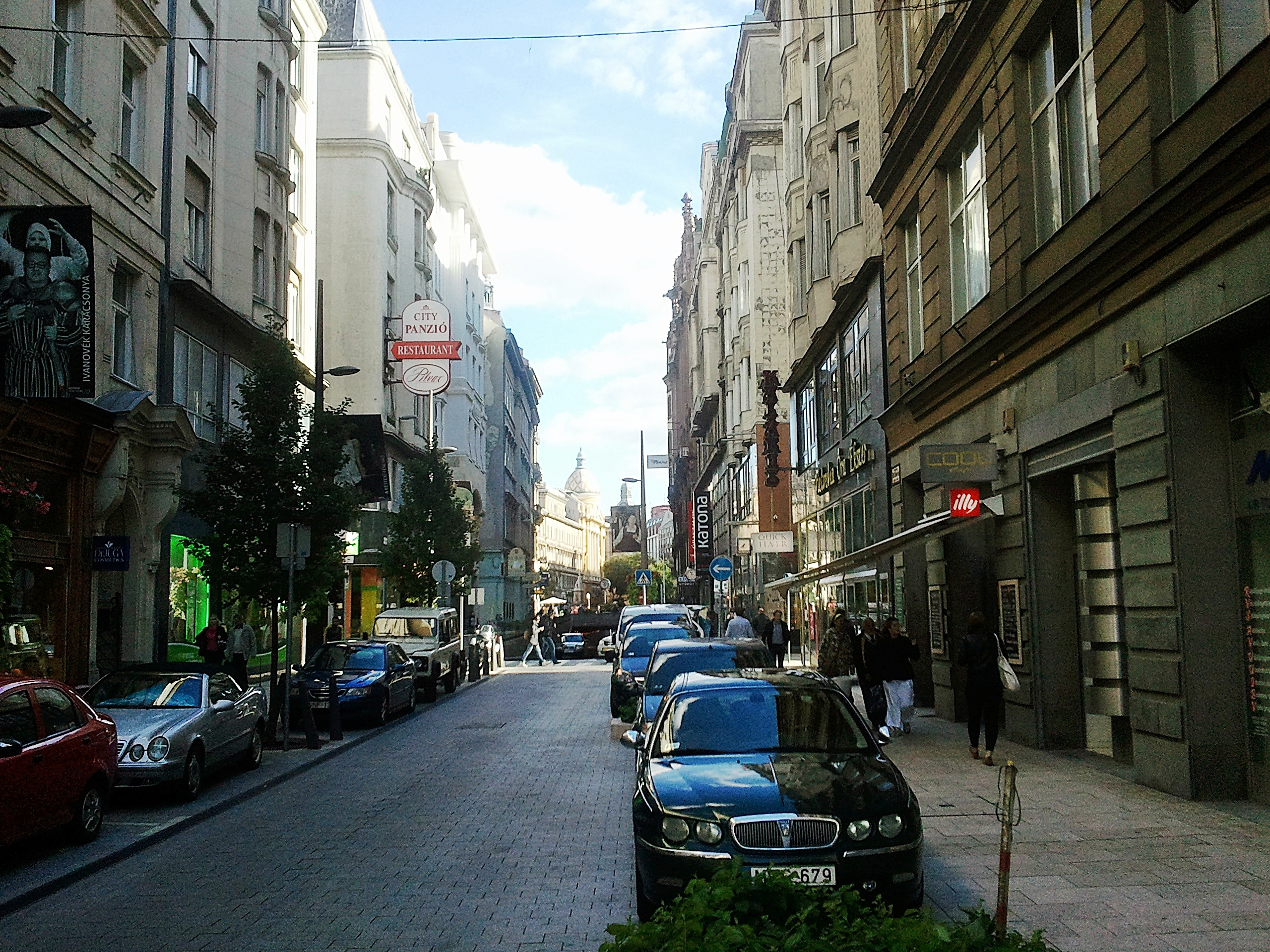 Petőfi Sándor utcarészlet. Jobboldalt a Katona József Színház. A színház 30. évfordulója.